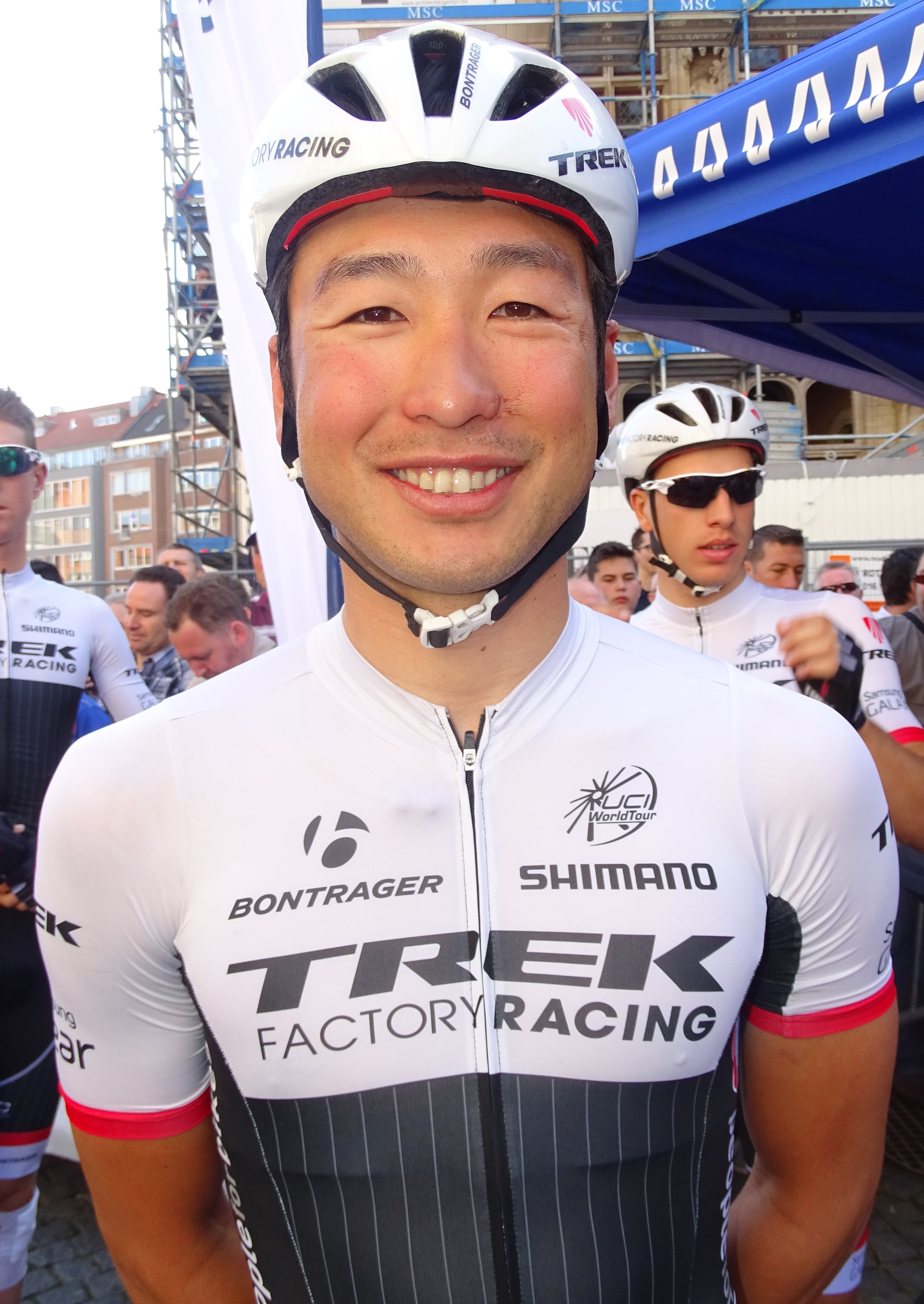 Reportage réalisé le mercredi 15 avril à l'occasion du départ de la Flèche brabançonne 2015 à Louvain, Belgique.